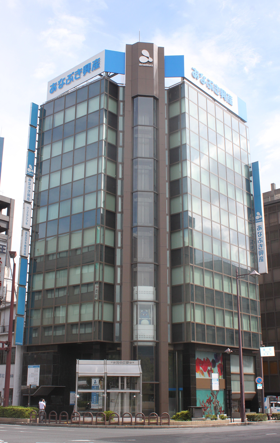 香川県高松市鍛冶屋町7-12